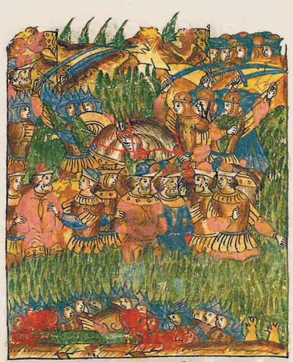 Лицевой летописный свод. 1514 год. "О Оршьском бою".